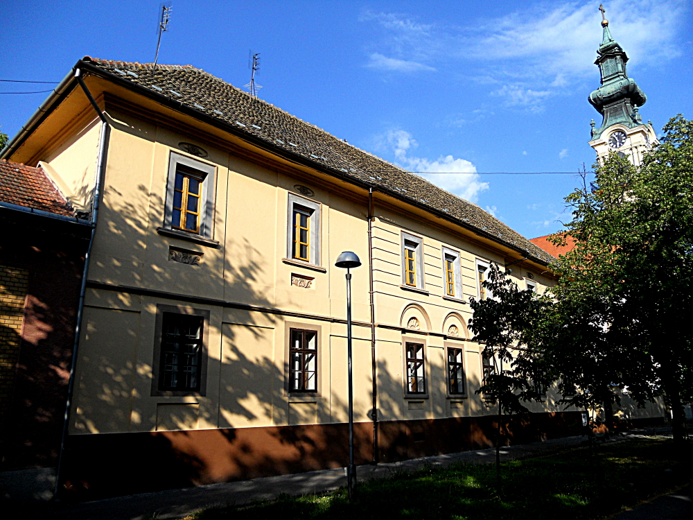 Crkva i parohija evangeličke crkve u Bačkom Petrovcu